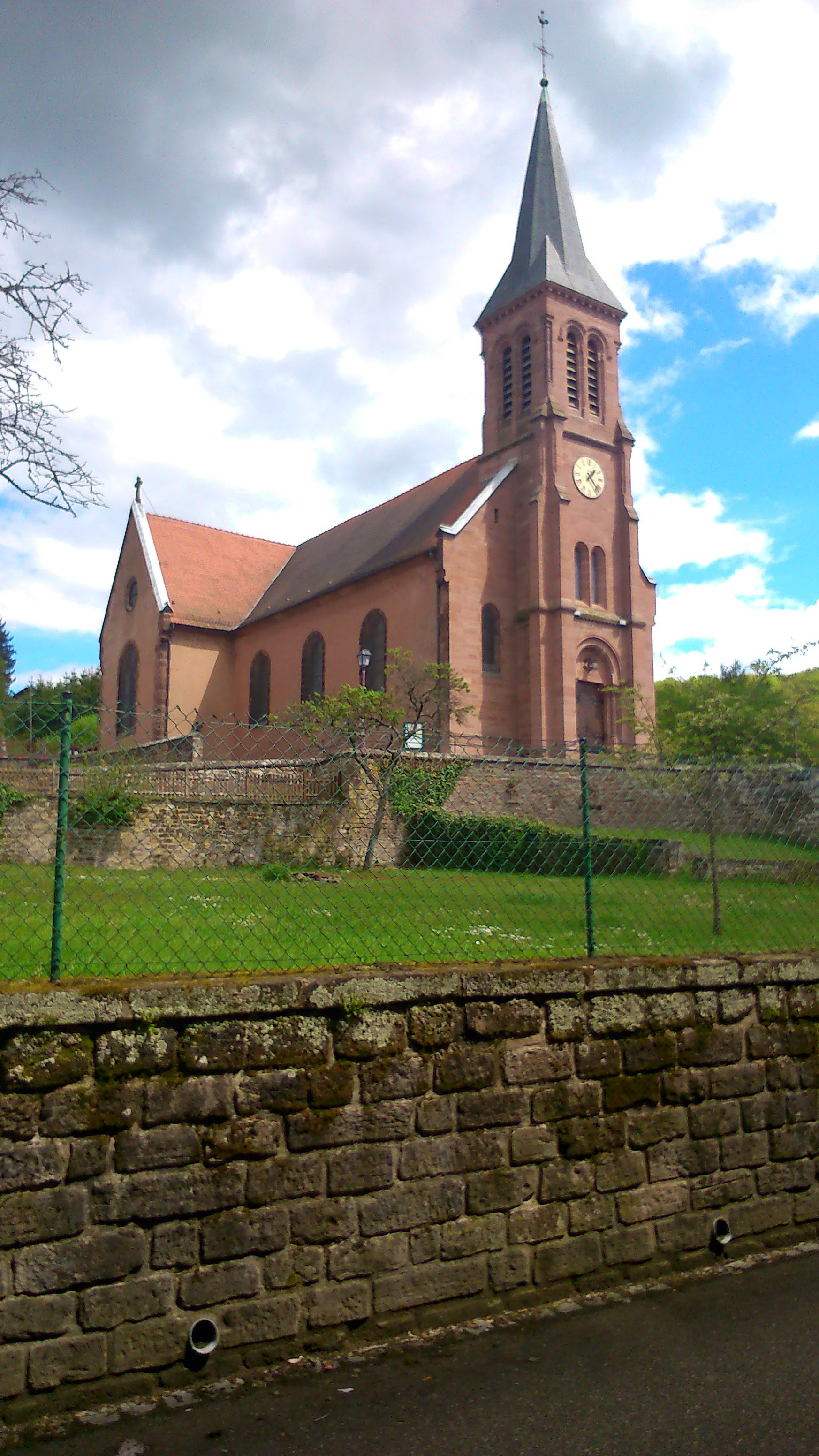 Eglise de Meisenthal (Moselle)